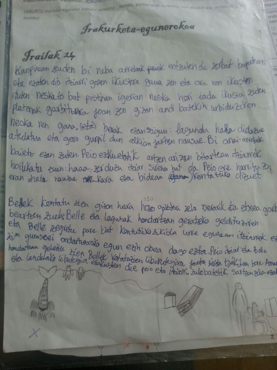 Lehen Hezkuntzako ikasle batek egindako idazlana.